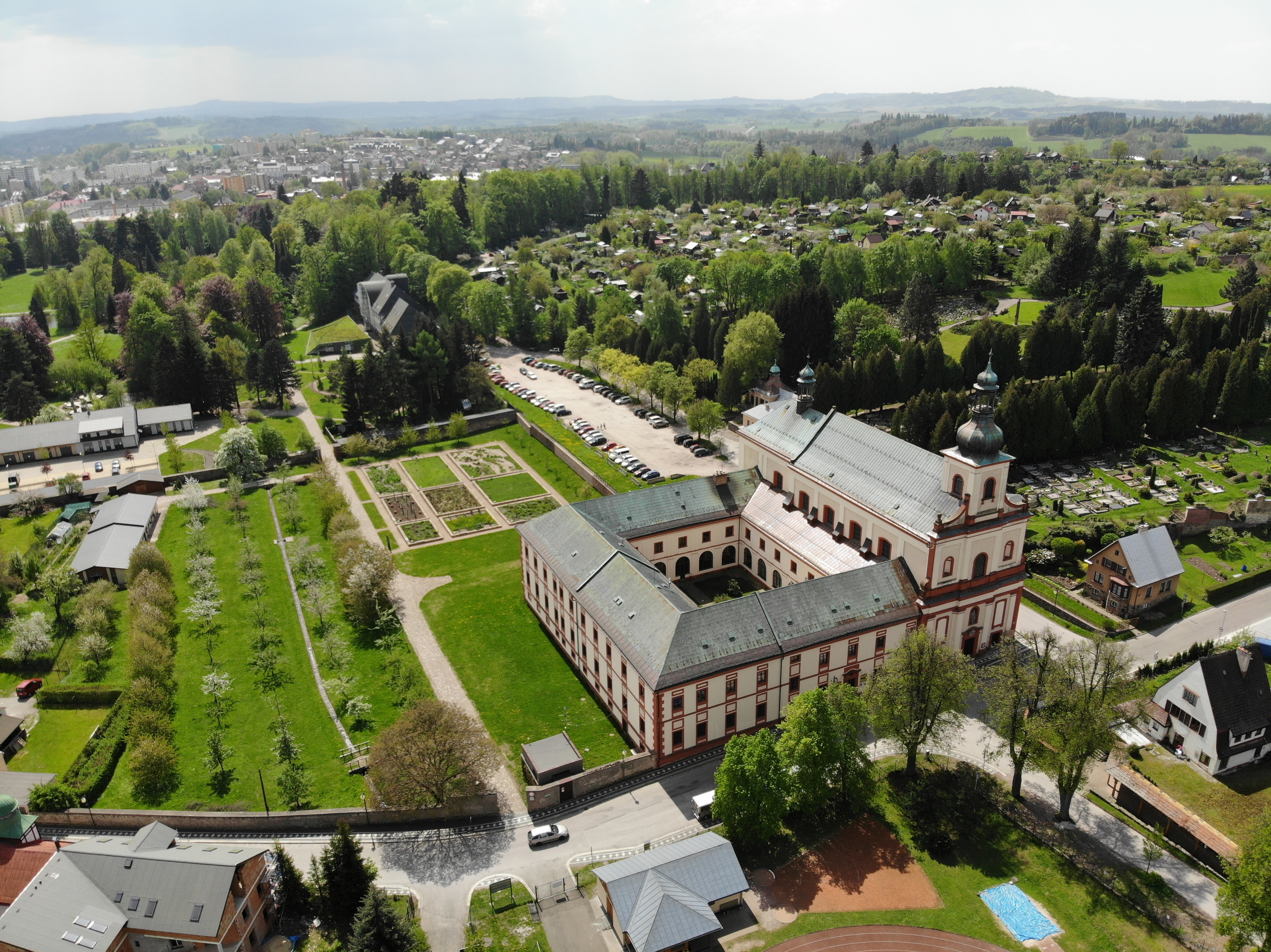 Krkonošské muzeum z ptačí perspektivy Project: Fotíme Česko.